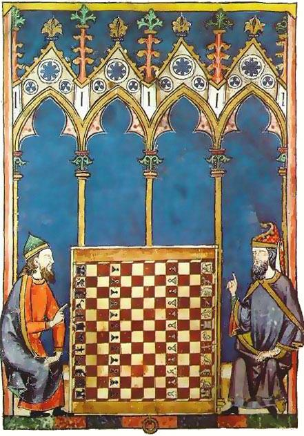 Darstellung des Grande Acedrex (13. Jahrhundert)